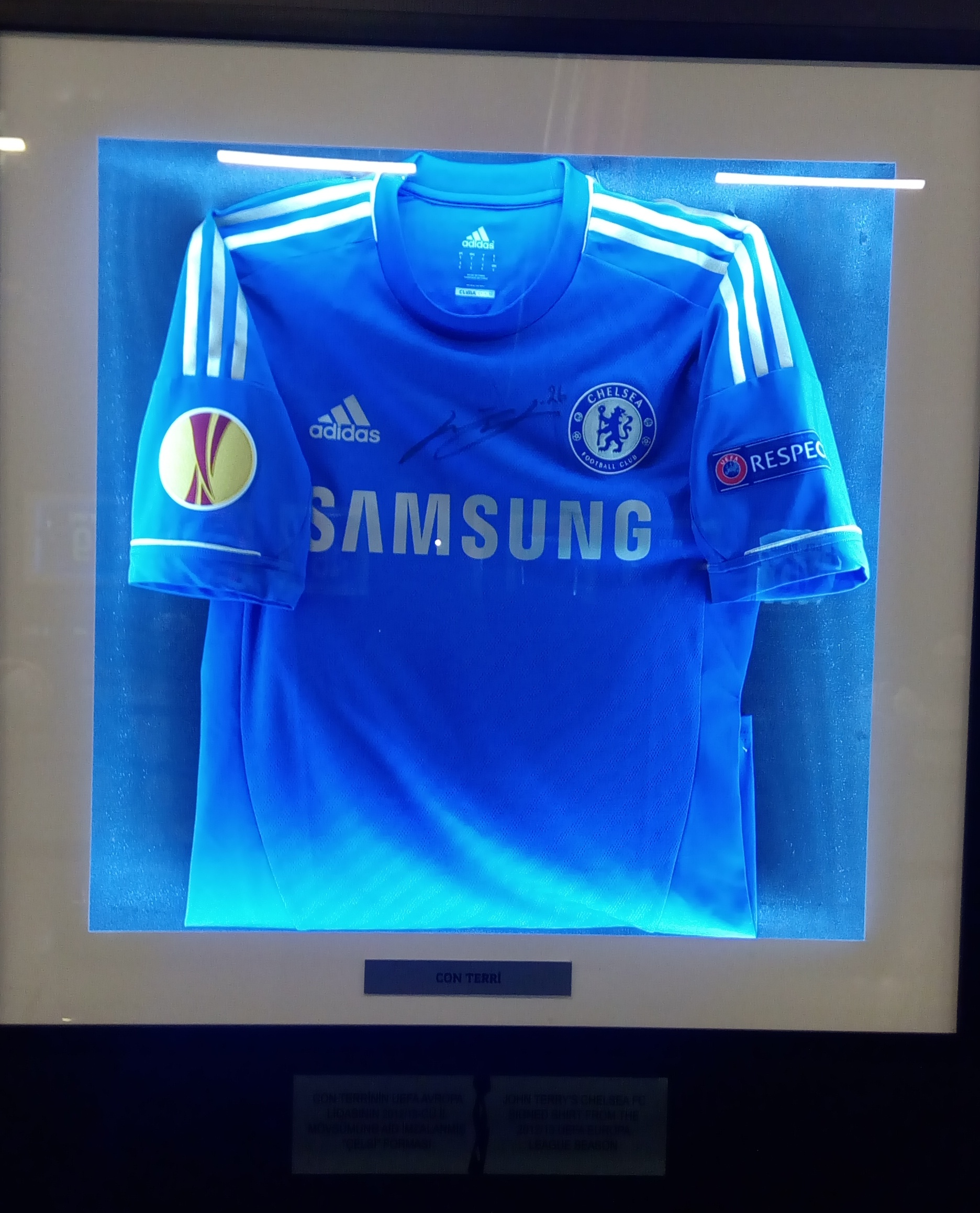 Avropa Liqası Muzeyi Bakıda